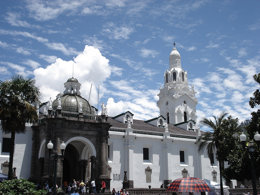 catedral de Quito